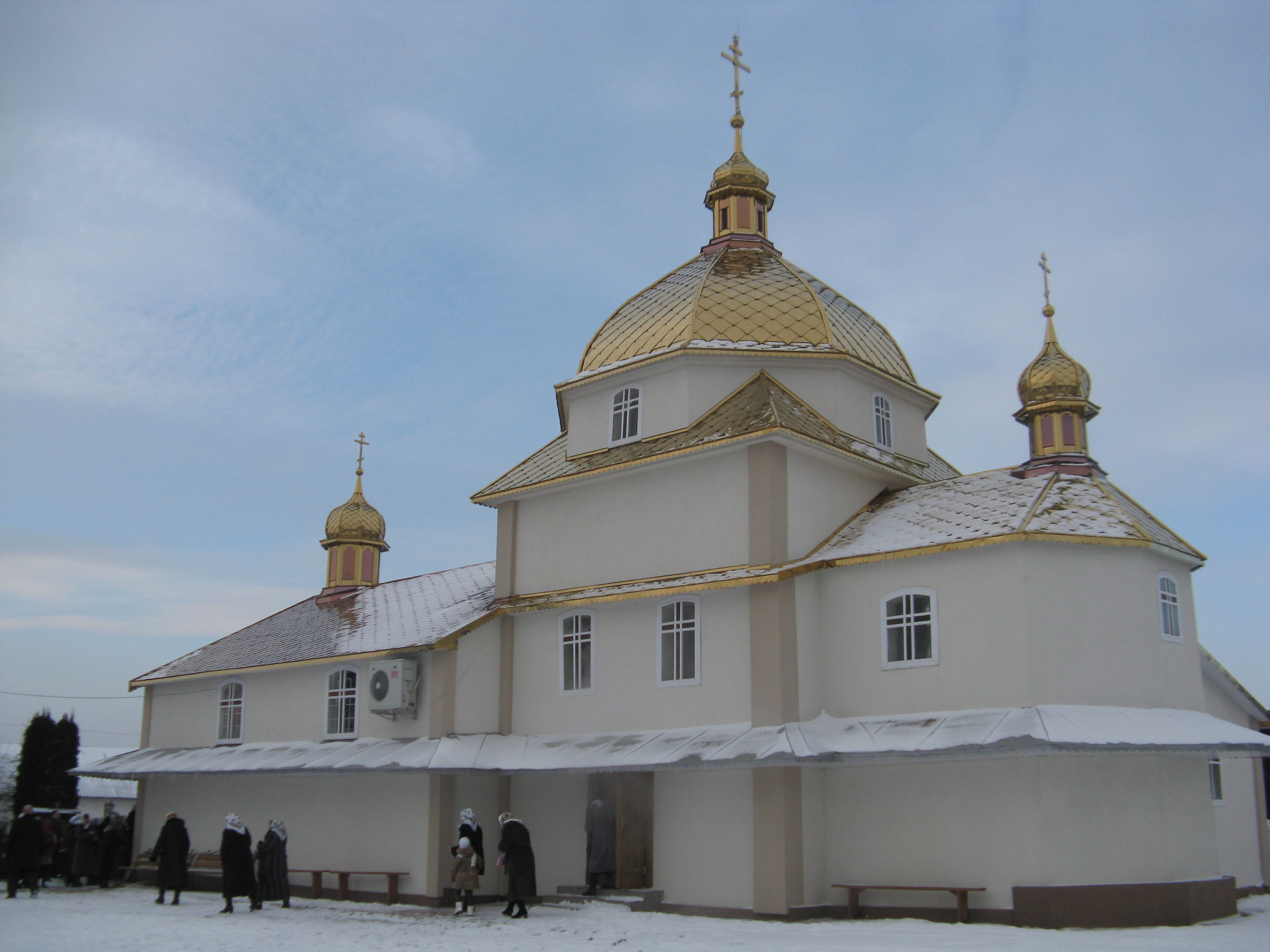 Храм Собору Пресвятої Богородиці с. Прилбичі (1654 р.)